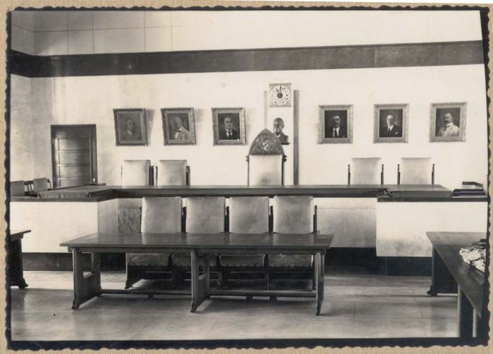 Foto. De raadszaal te Soerabaja met de door Charles Sayers geschilderde portretten van de laatste zes burgemeesters